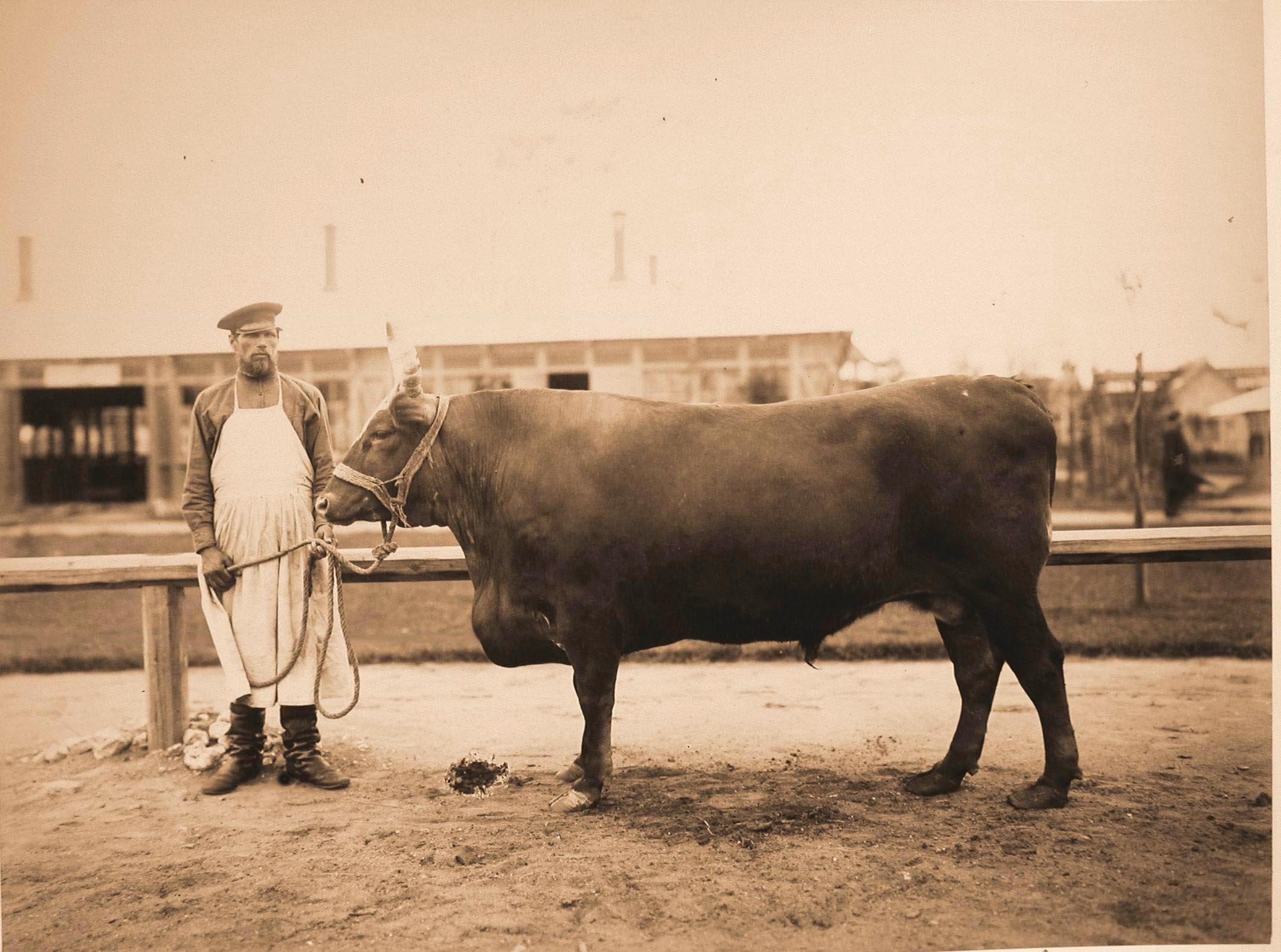 Выставка племенного рогатого скота. Москва 1896. 17.Вол Калмык Калмыцкой породы, выращенный в имении Кулешова .jpg